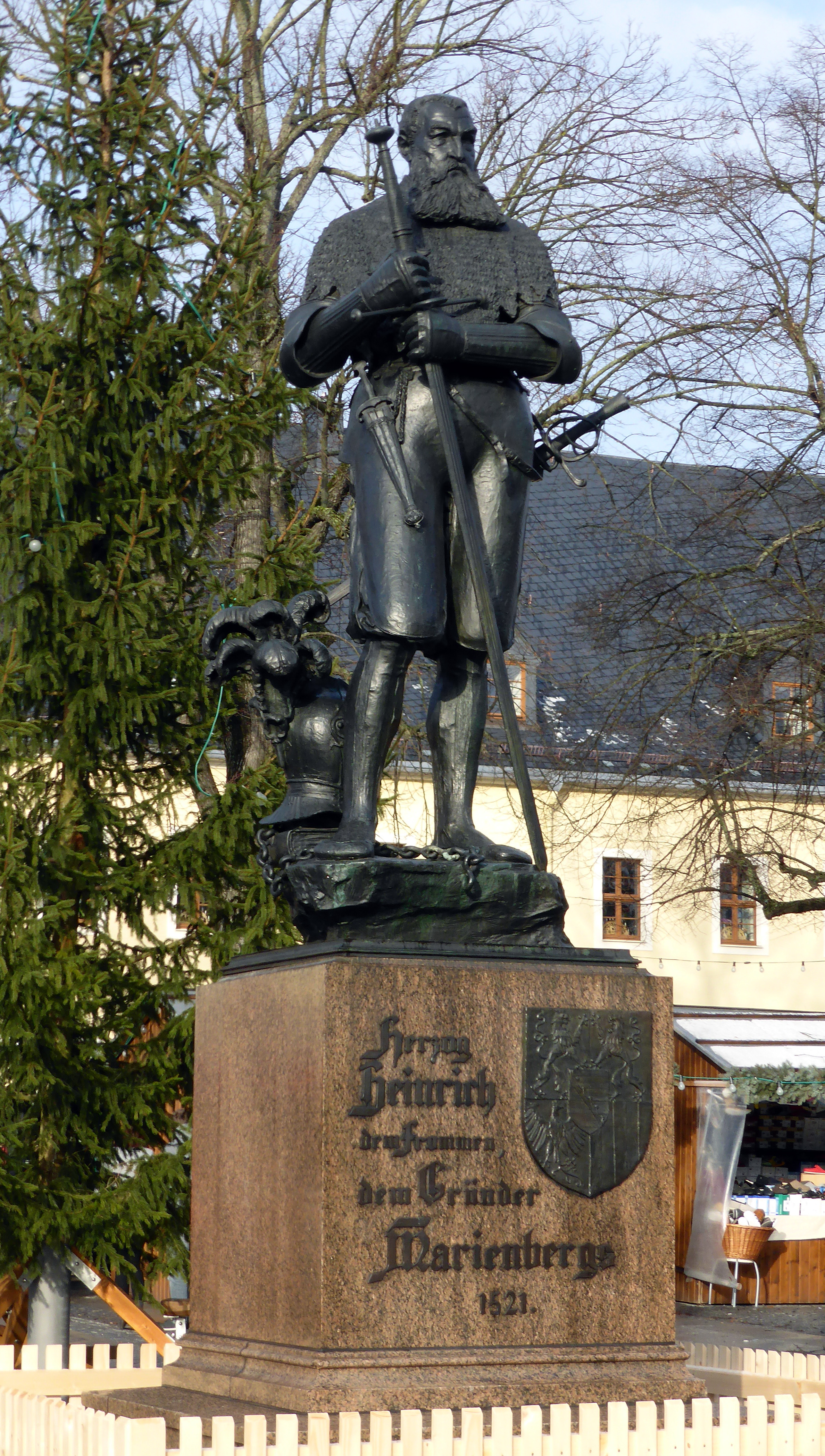 Denkmal Herzog Heinrich der Fromme, Gründer Marienbergs 1521 - (Marktplatz Marienberg).